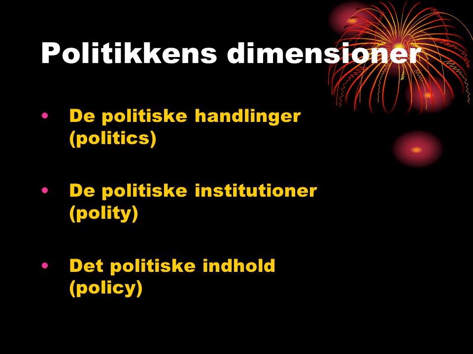 dimensioner i den politiske proces